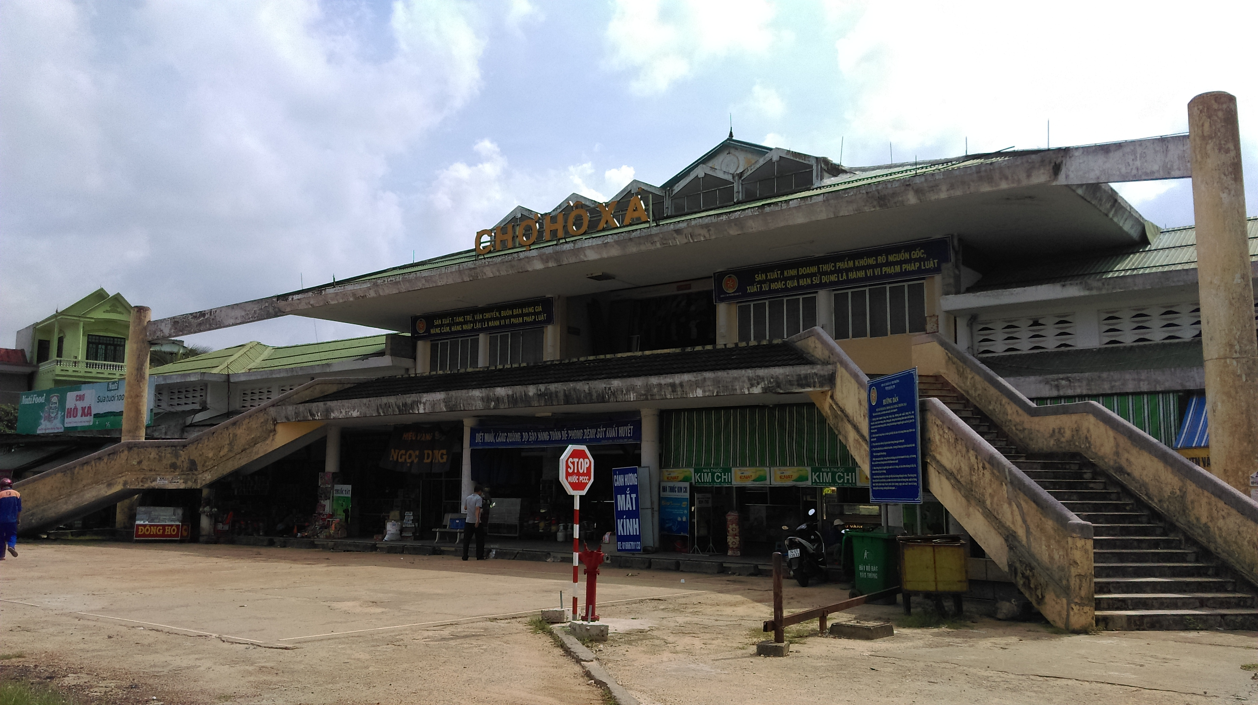 Chợ Hồ Xá, Vĩnh Linh, Quảng Trị